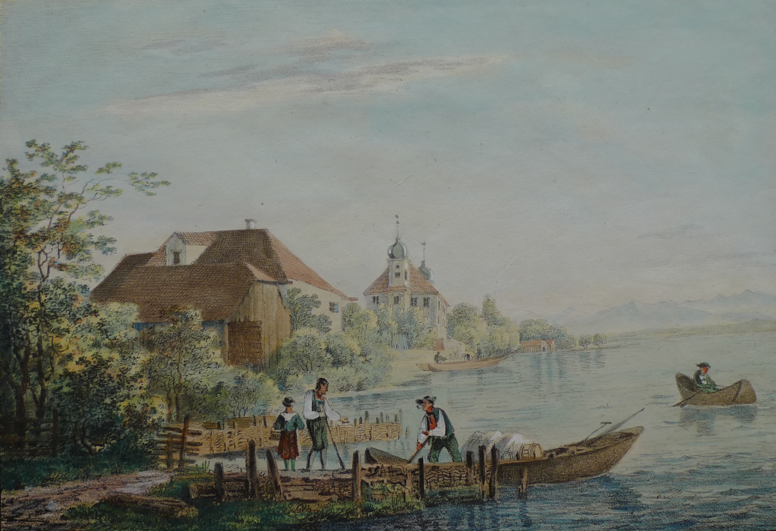 Max Joseph Wagenbauer: "Das Schloss Amerland am Würmsee." Kolorierte Lithografie, München 1810.